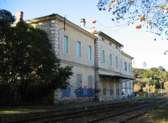 Les quais de la gare de St Ambroix Photo prise par Vpe en novembre 2005. photographie personnelle, si vous voulez utiliser cette image, merci d'en indiquer la source.